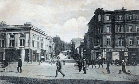 Kiev, Kreschatik and Institutska streets. Gardeners' shop „W. Krister“ (on right)